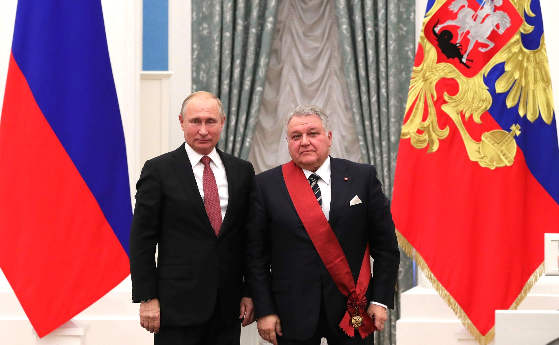 Вручение государственных наград. Орденом «За заслуги перед Отечеством» I степени награждён президент НИЦ «Курчатовский институт» Михаил Ковальчук.